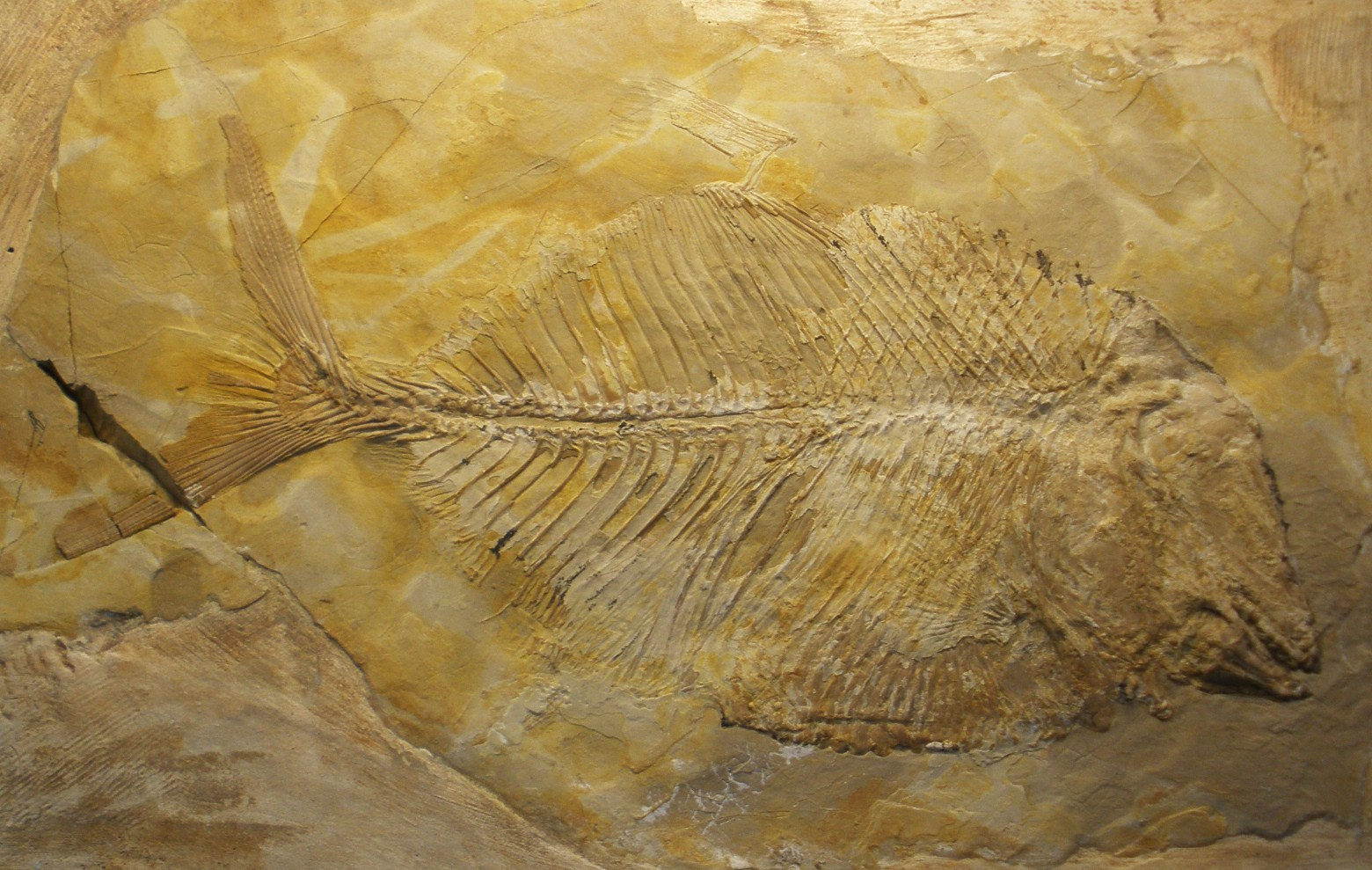 Fossil of Proscinetes, an extinct fish Took the photo at Musee d'Histoire Naturelle, Brussels